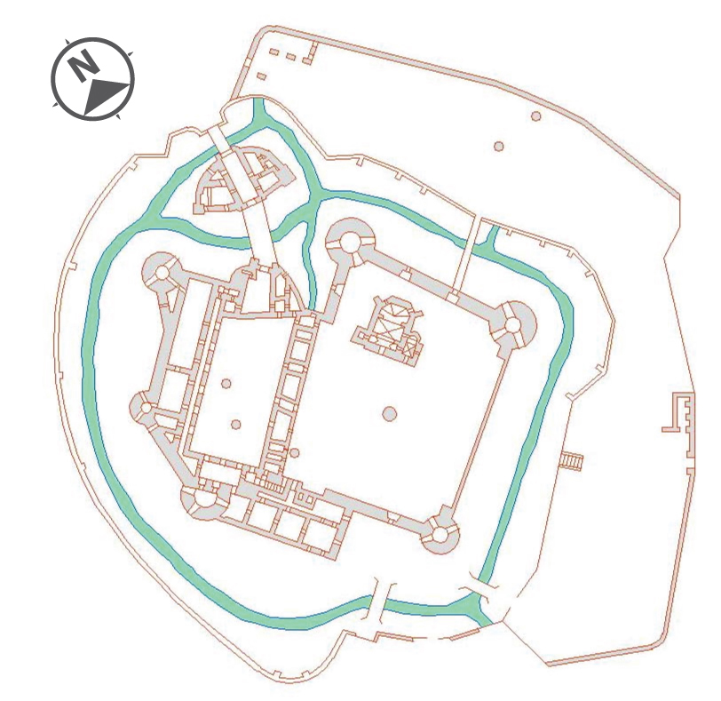 Koberdorf, Schloss, Grundriss (mit Nordpfeil)